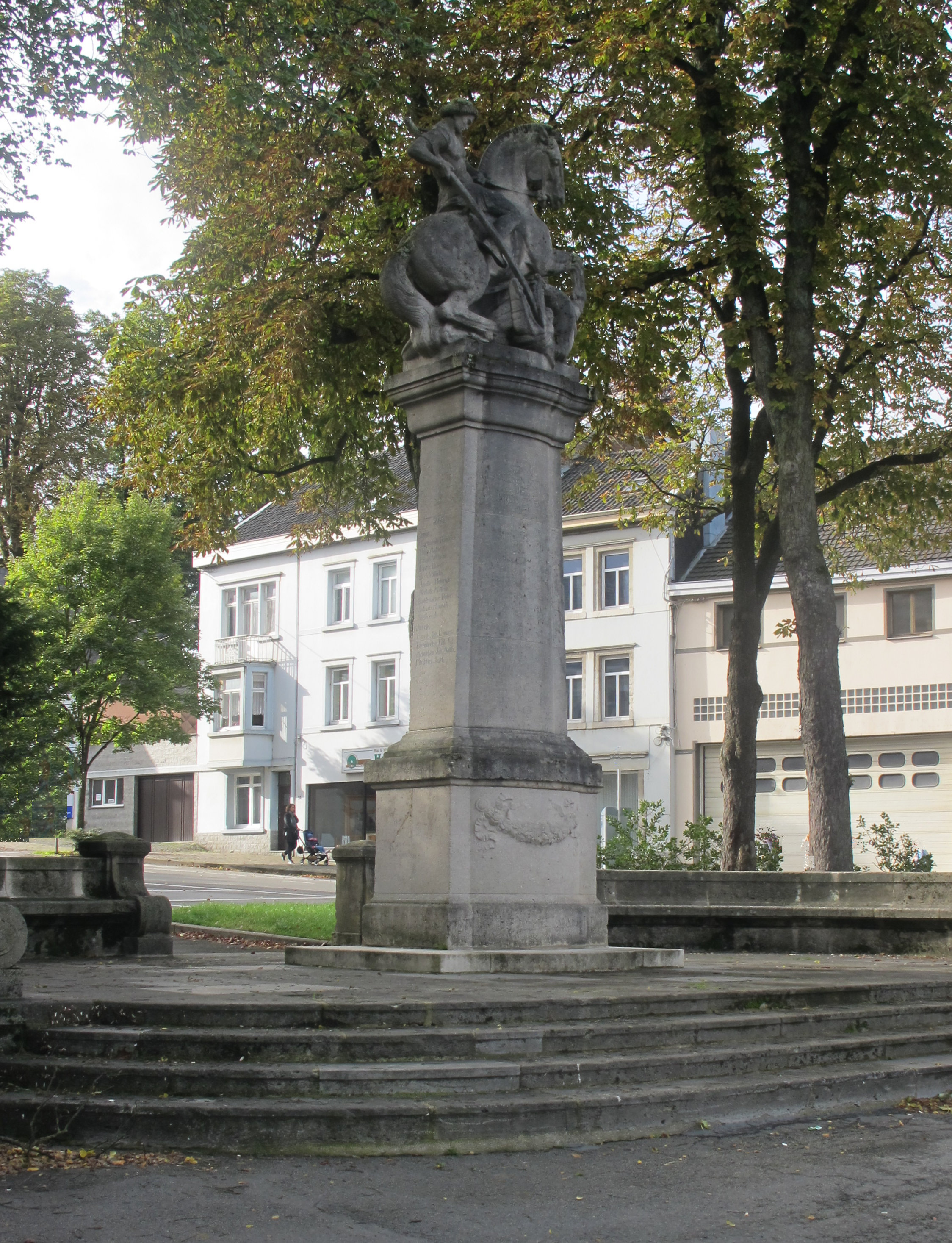 Kriegerdenkmal in Eupen, Werthplatz; 1912 von Bildhauer Rudolf Henn (München); unter Denkmalschutz